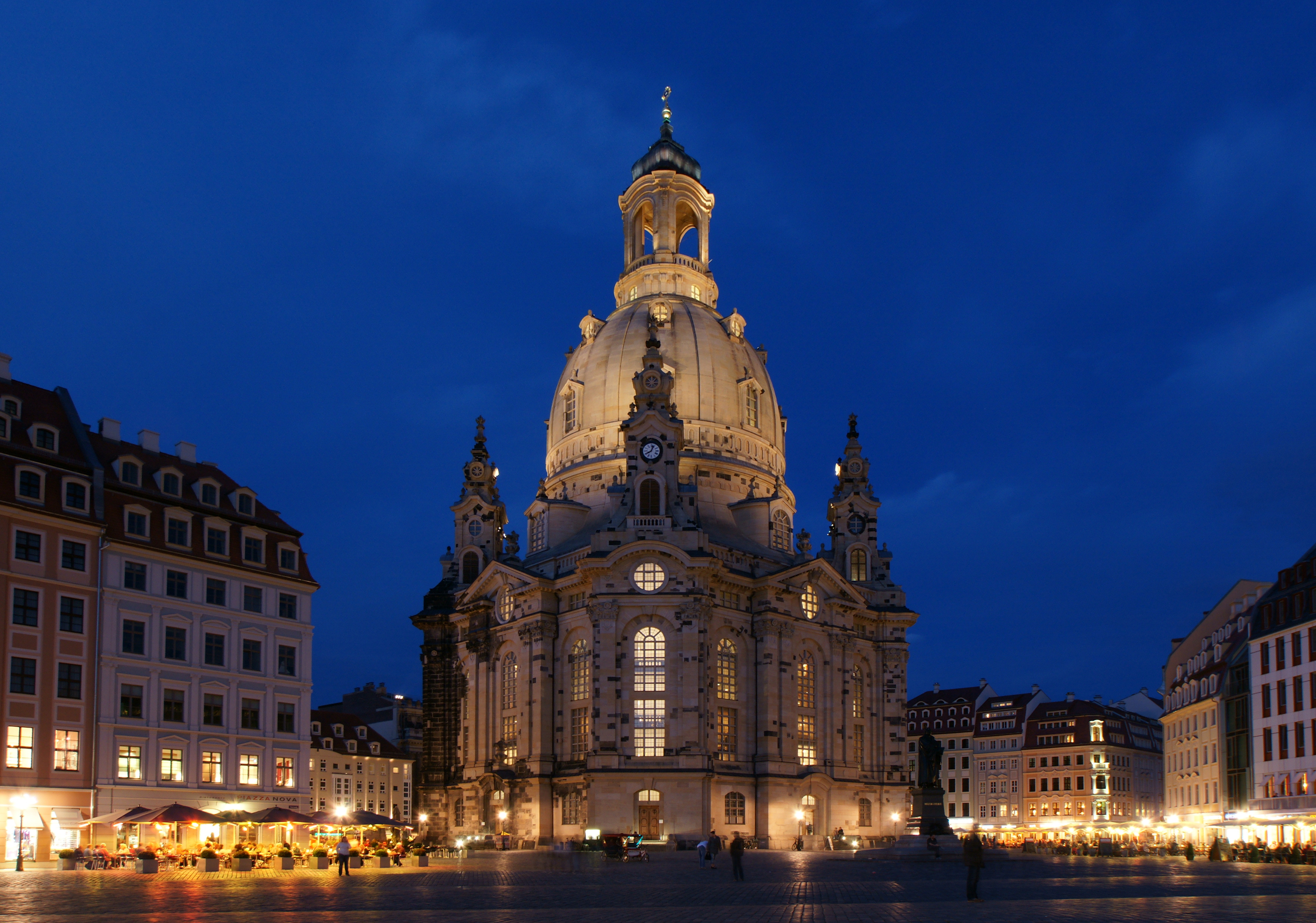 Die Dresdner Frauenkirche in der Blauen Stunde aufgenommen.